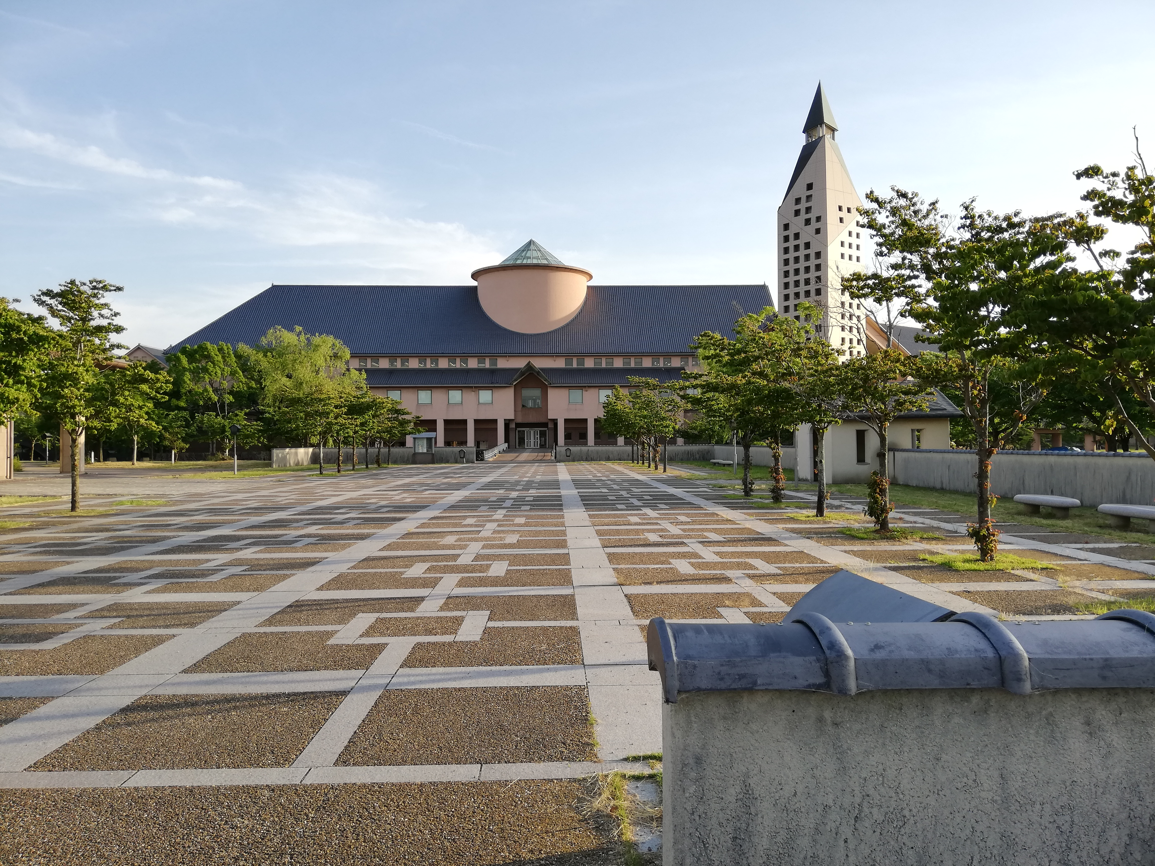 滋賀県立大学の一角。正面はA5棟。図書情報センターと、通称「鉛筆塔」や「とんがり」と呼ばれる室外機の塔。